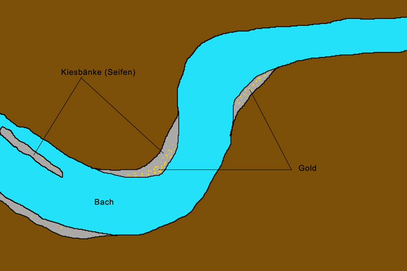 Flussseife (Geologie)